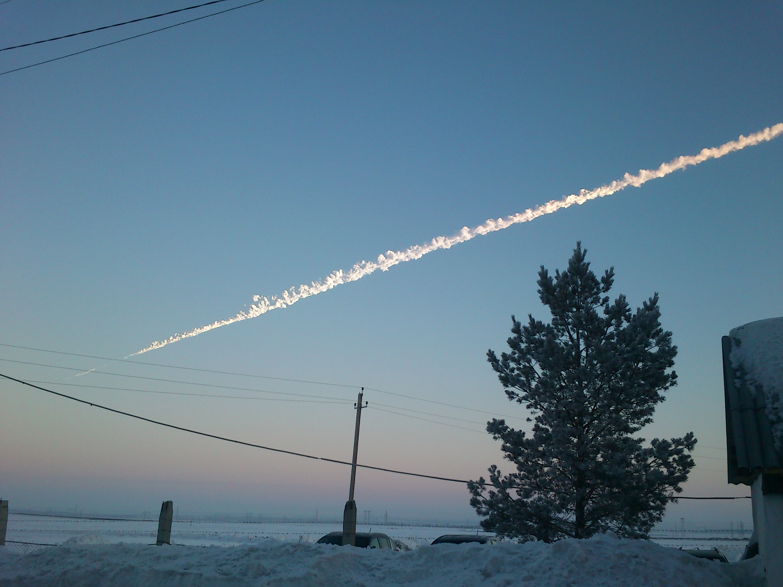 Падение метеорита в Троицке